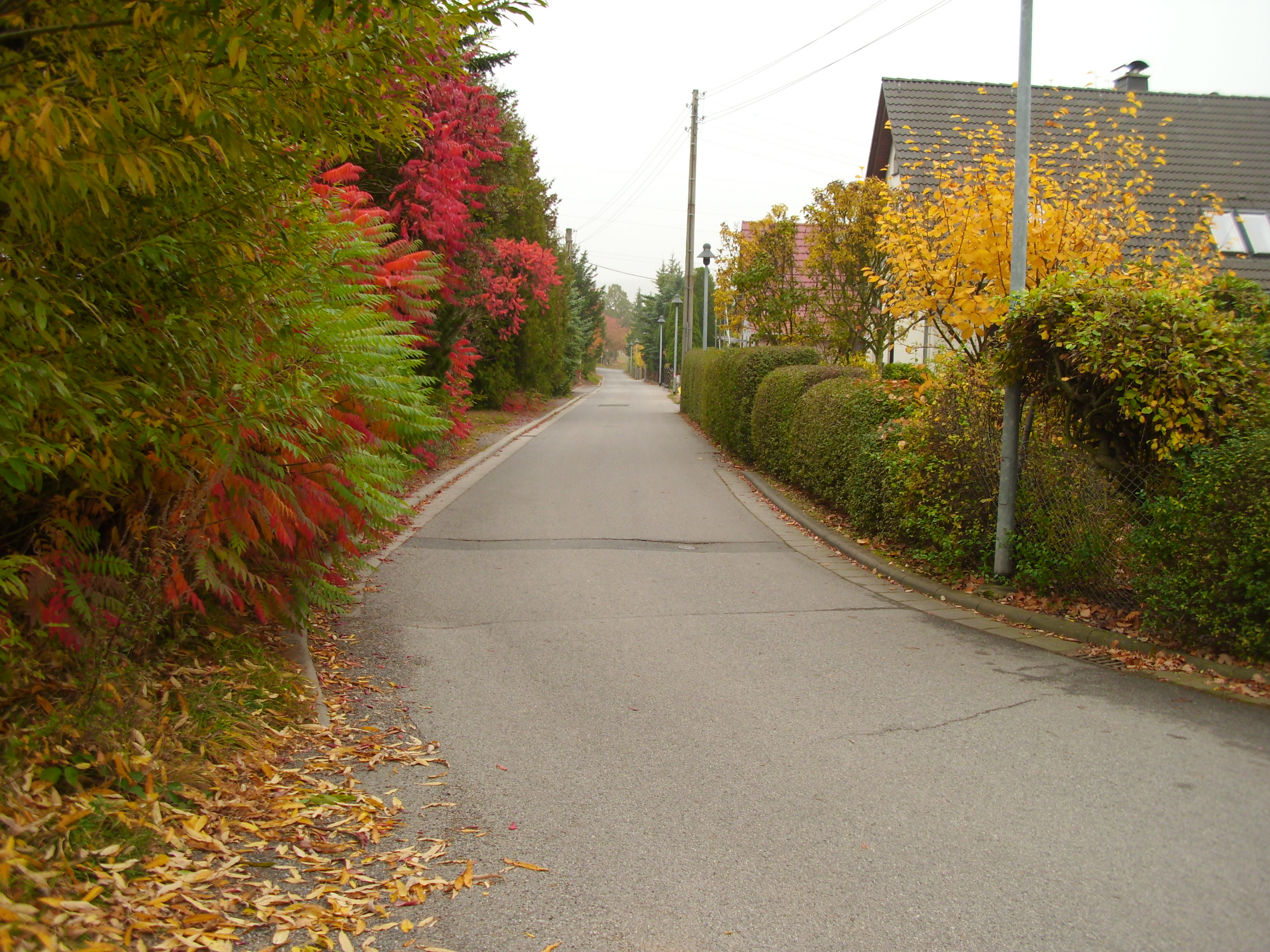 Der Waldesrand ist ein aus Häuser und Gärten bestehnder Teil der Ortschaft Seifersdorf.